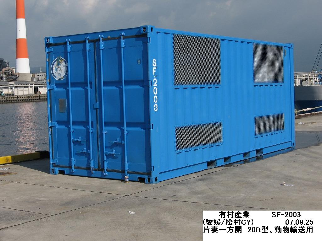 詳しくは焼付け解説を参照下さい。 【 愛媛県 ／松村埠頭にて 】